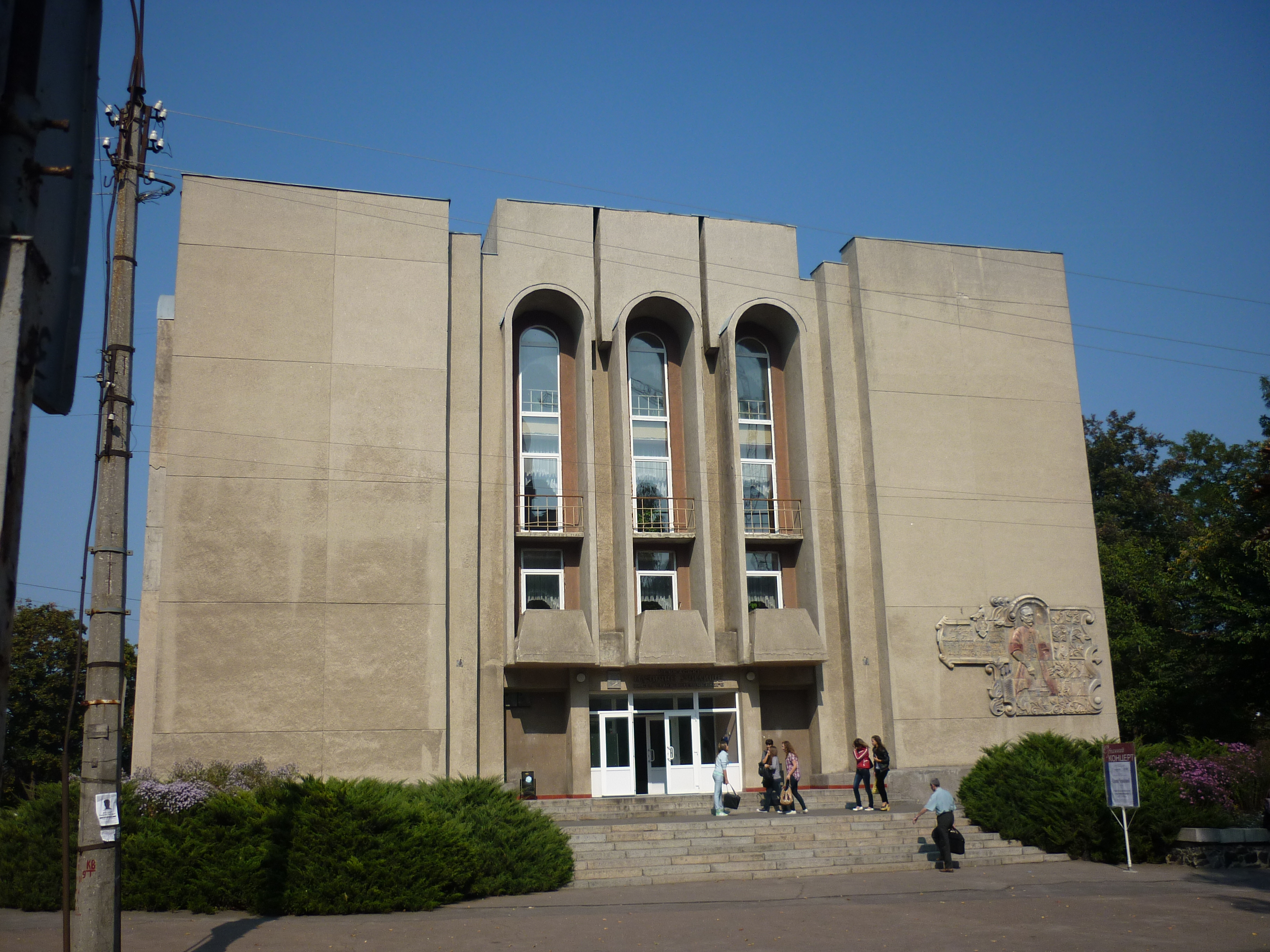 черкаське музичне училище